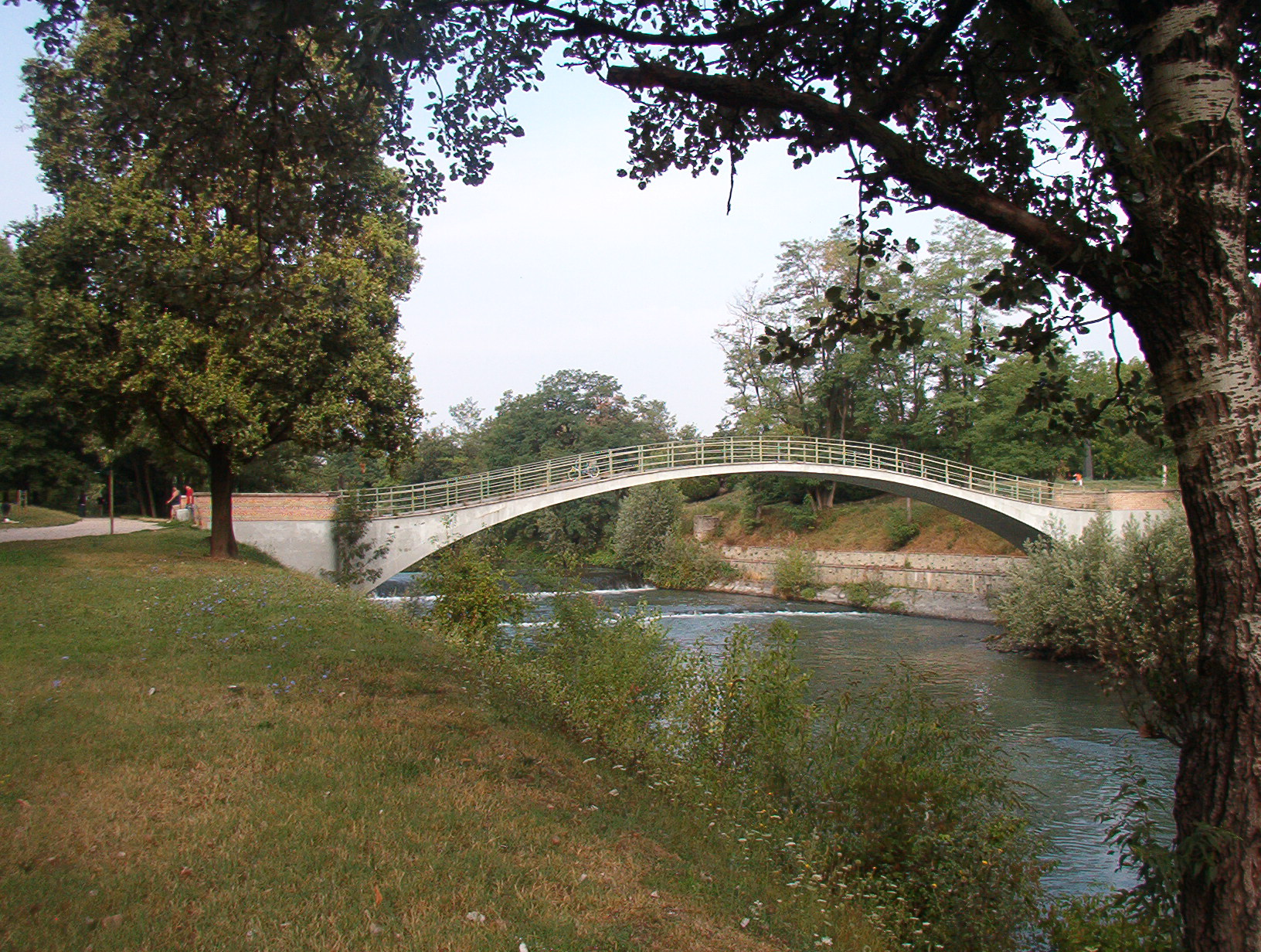 Parco della Pellerina - Torino - Piedmont - Italy